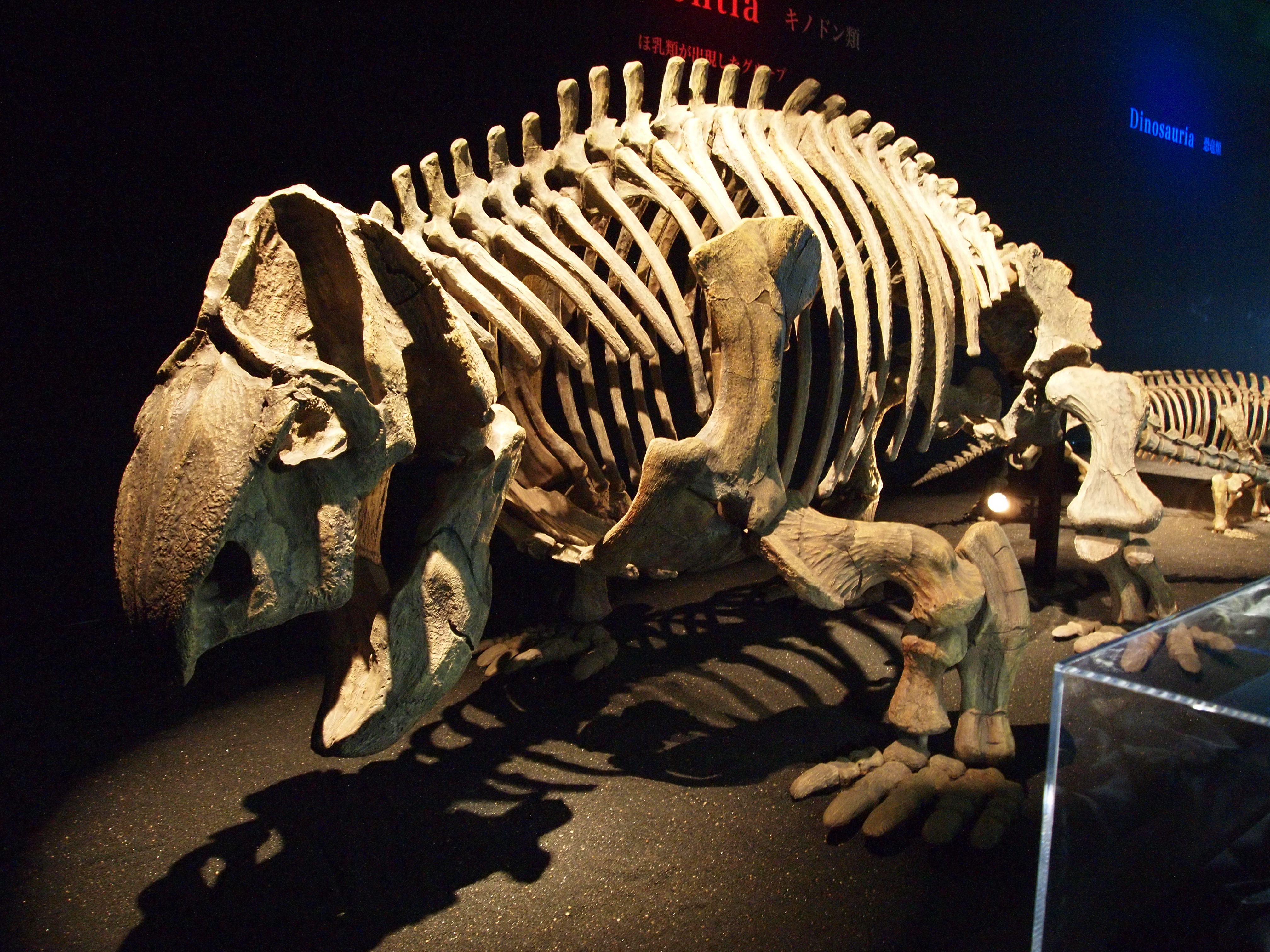 森アーツセンターギャラリー